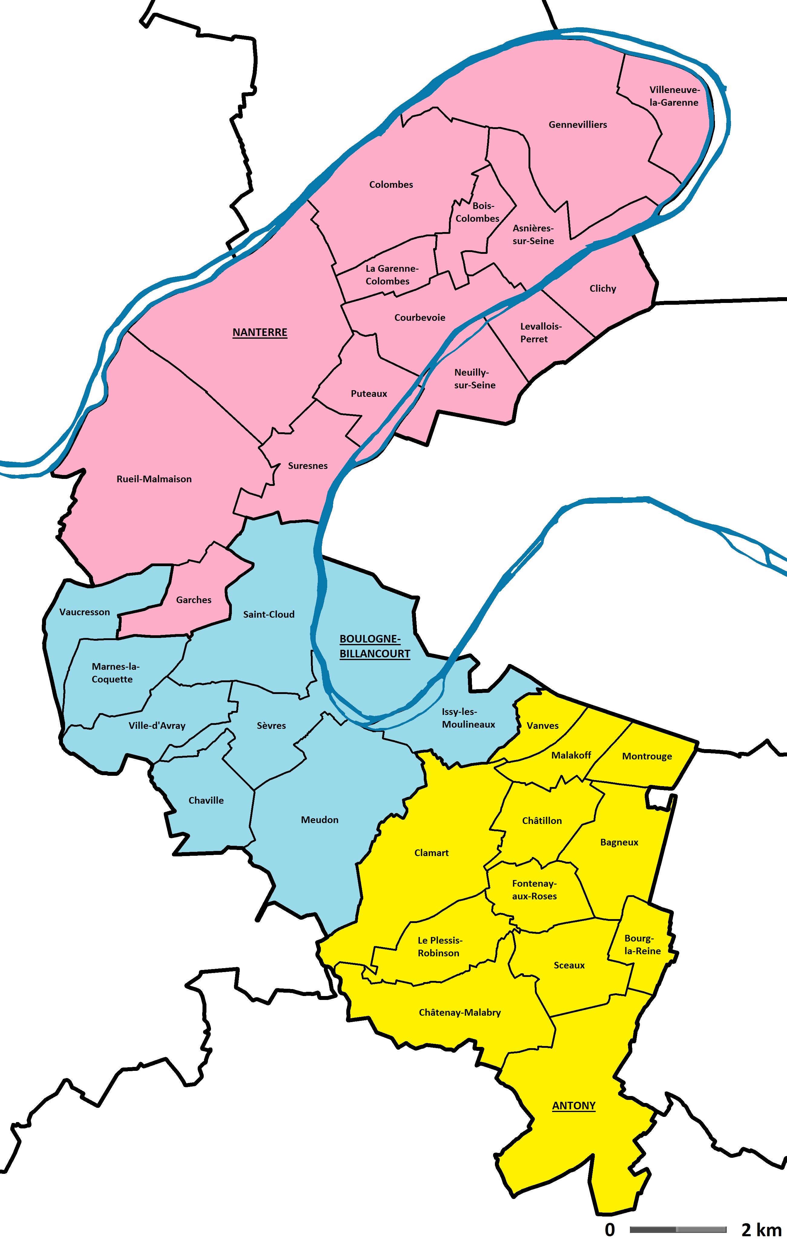 Carte administrative des Hauts-de-Seine